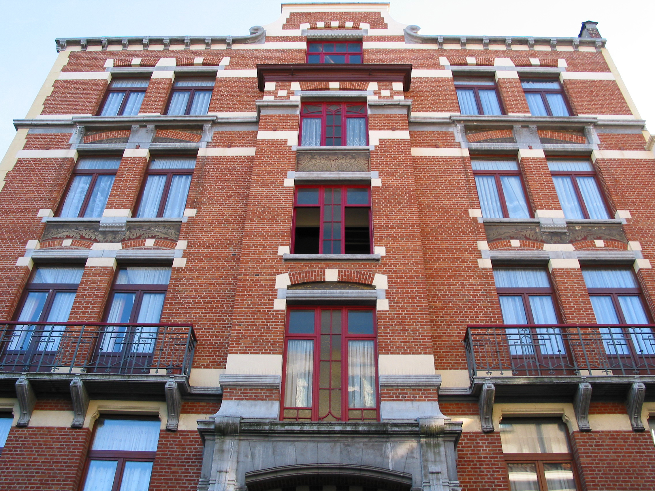 Schaerbeek (Bruxelles), immeubles du Foyer schaerbeekois - Architecte: Henri Jacobs.